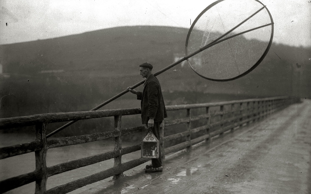 Título original: Angulero con sus aparejos por un puente (1/1) Localización: Guipúzcoa